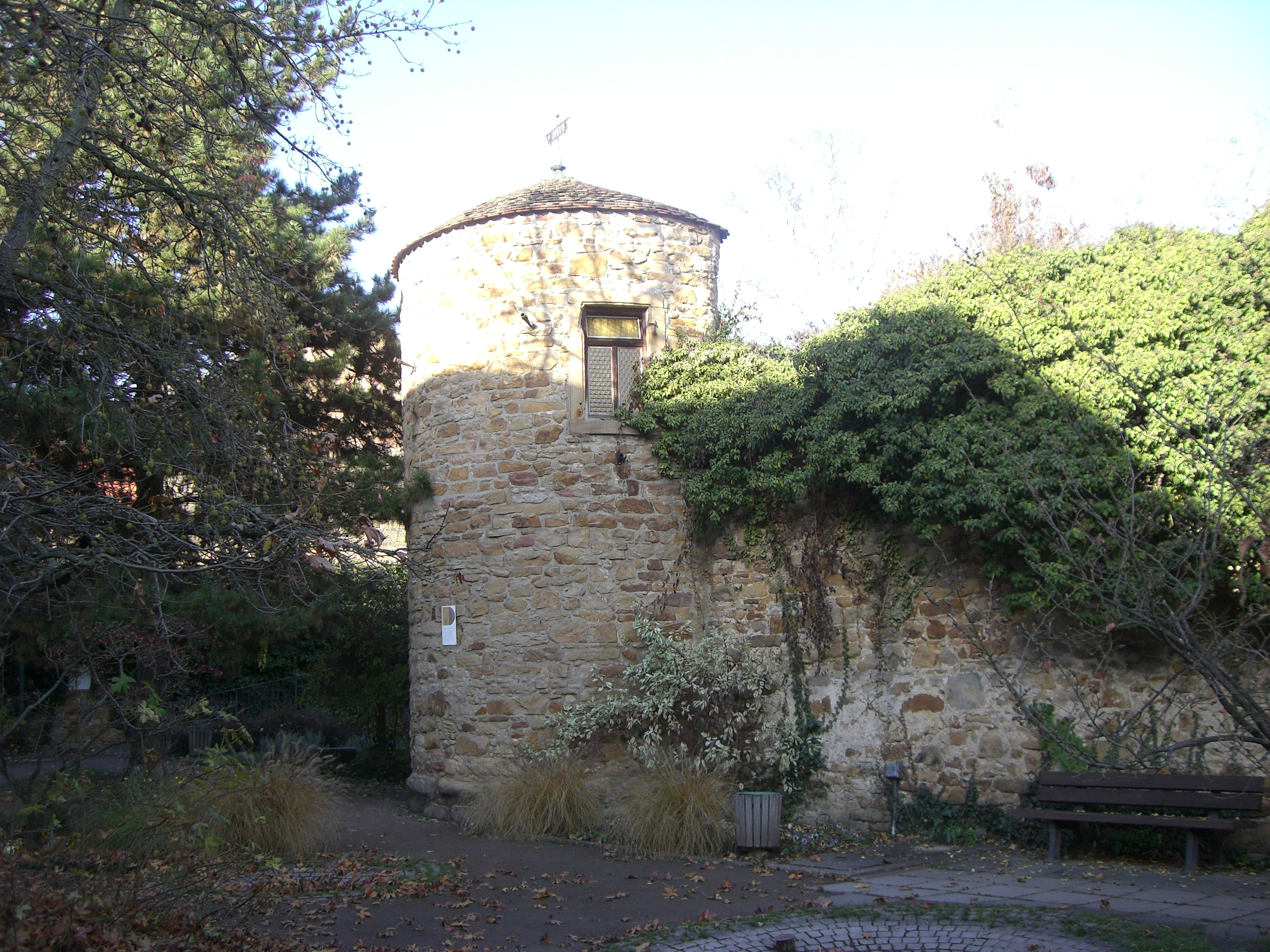 Ein Türmchen des ehemaligen Deidesheimer Schlosses, heute symbolische Residenz des Deidesheimer Turmschreibers